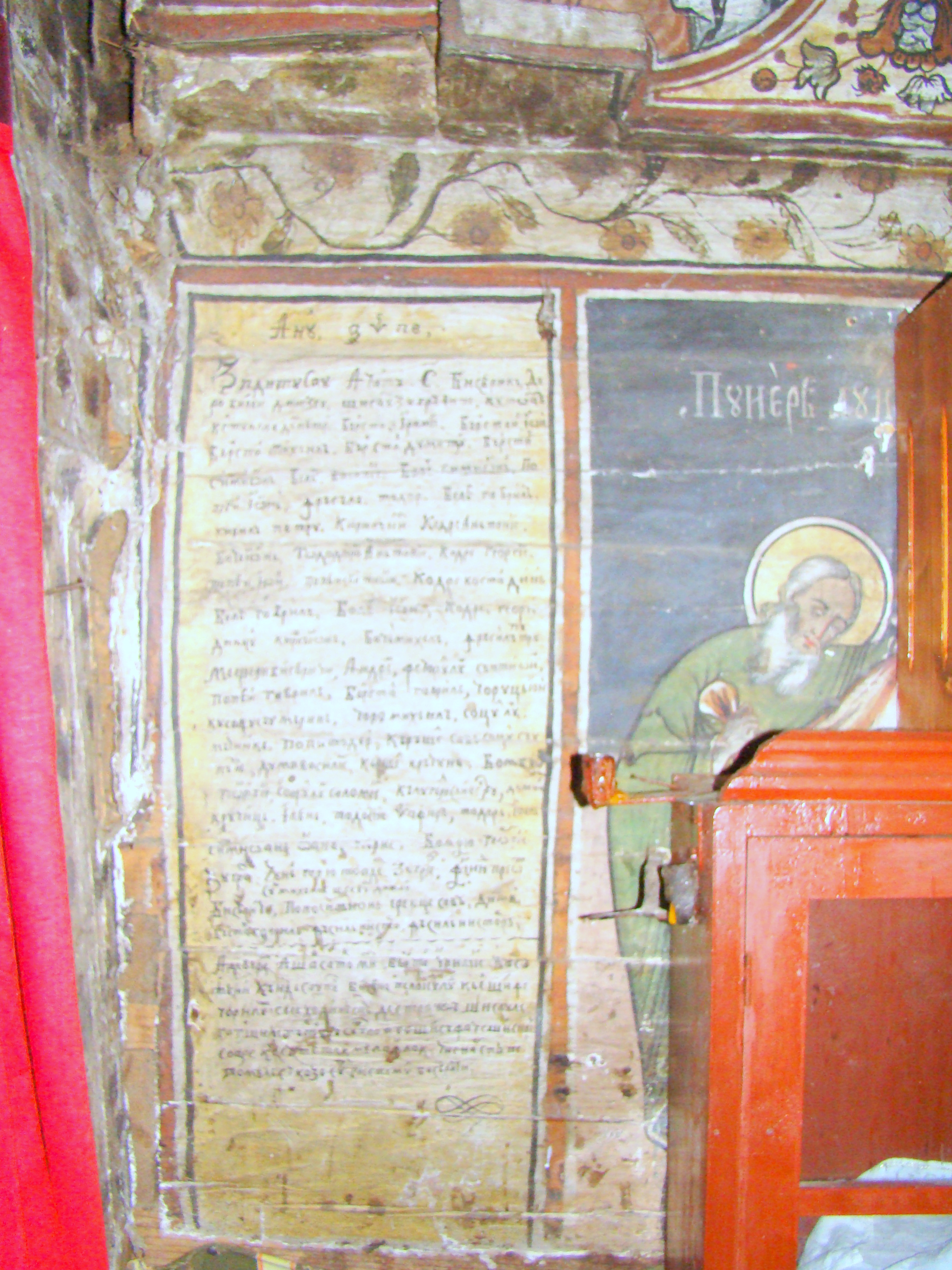 Biserica de lemn din Valea Largă-Alba